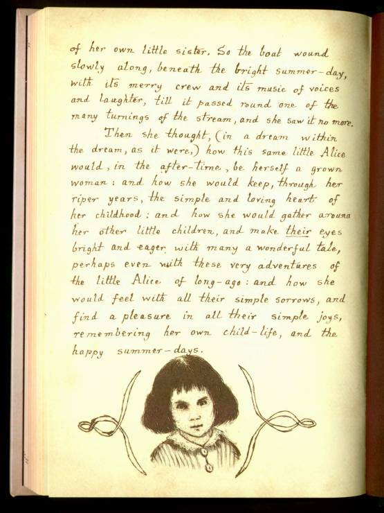 Lewis Carroll (Charles Lutwidge Dodgson). Alice's Adventures in Wonderland, illustrated by Carroll for Alice Liddell (первоначальная версия)